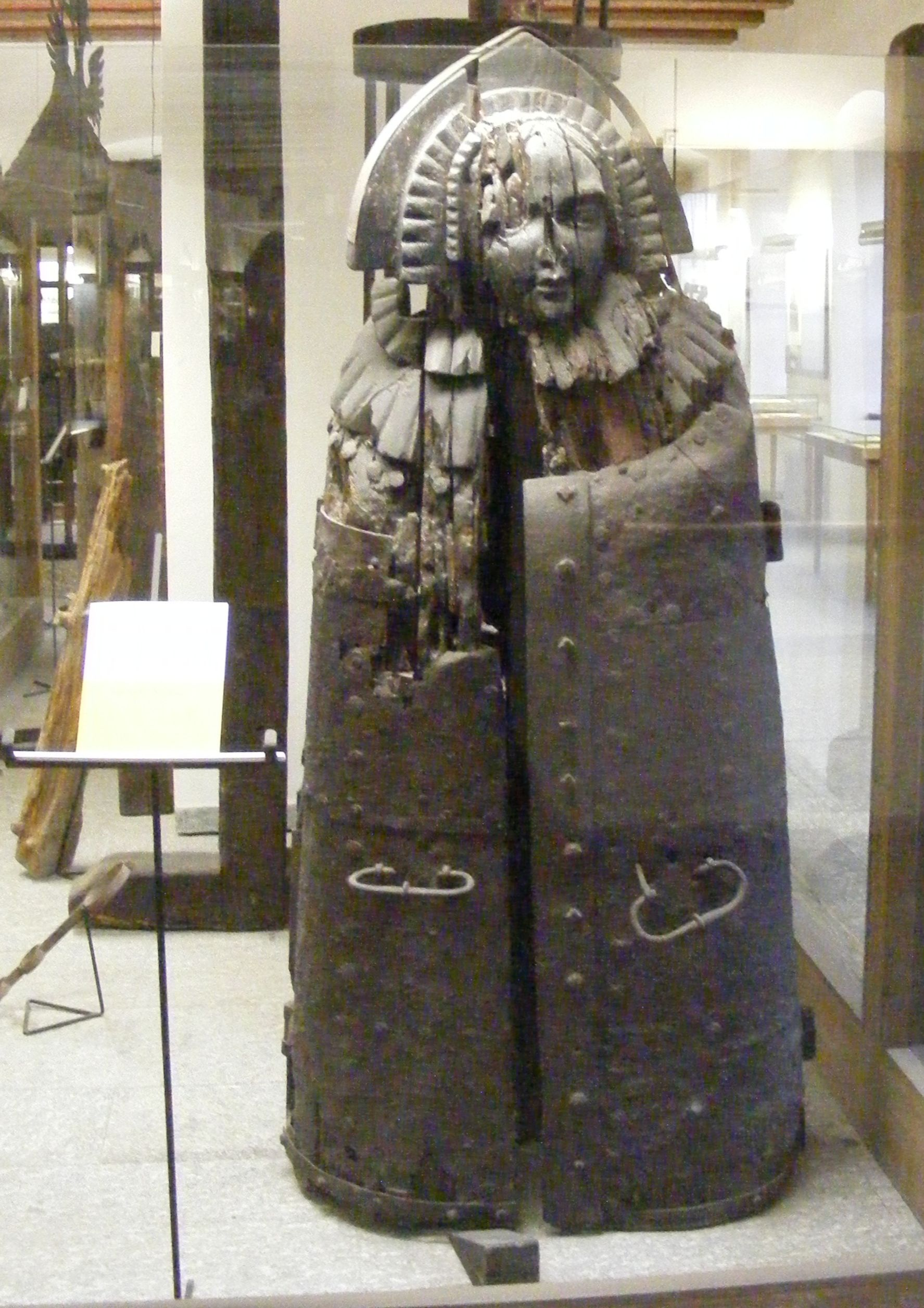 Eiserne Jungfrau von Nürnberg, 15. od. 16. Jh. (Exponat im Mittelalterlichen Kriminalmuseum Rothenburg ob der Tauber).